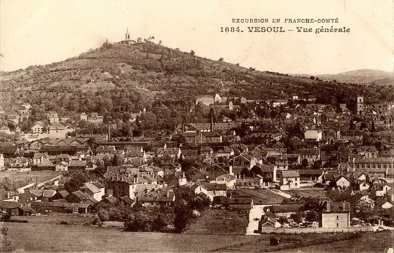 Vue de Vesoul en février 1918